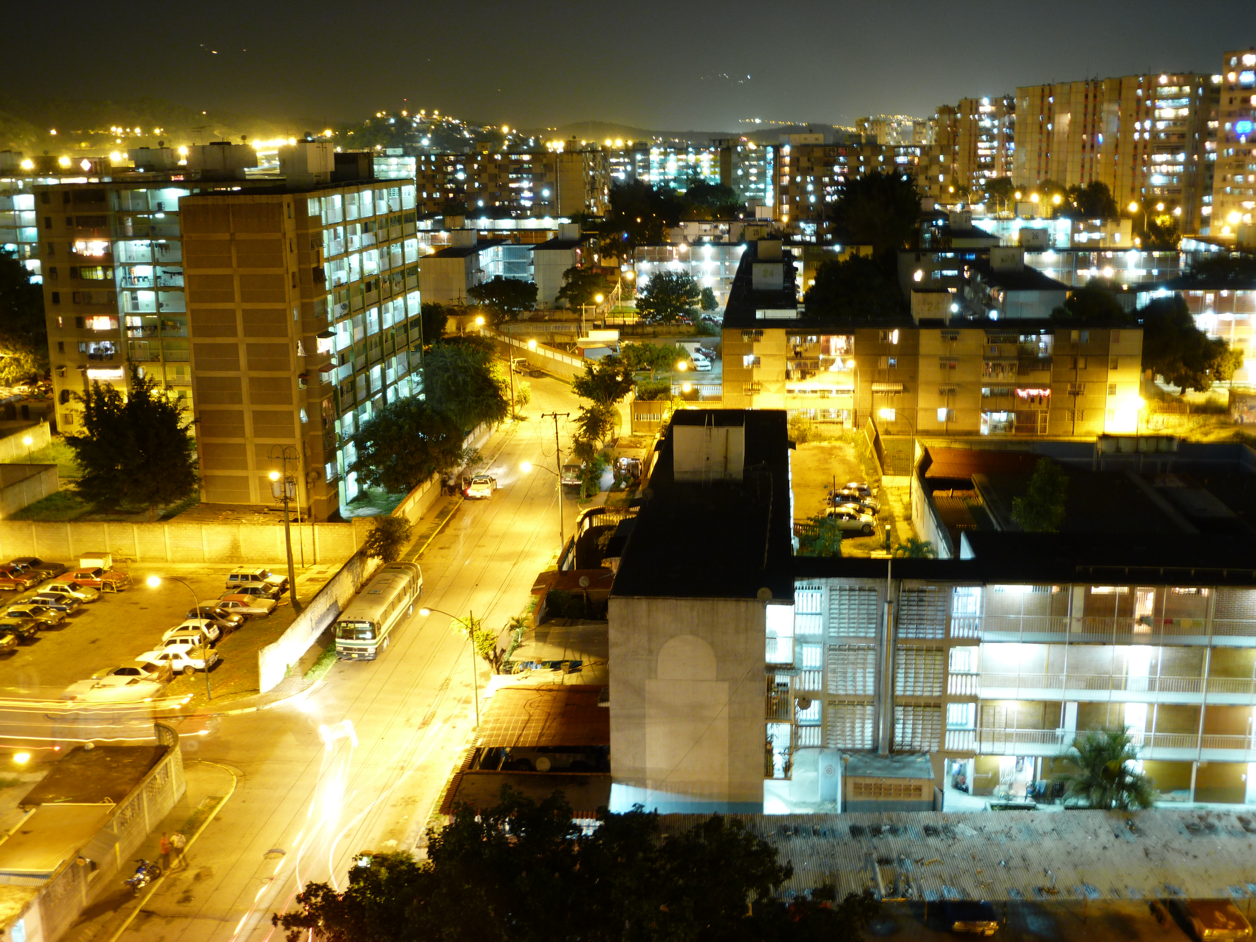 FOTO NOCTURNA DE LA ANTIGUA URB. DOÑA MENCA DE LEONI, AHORA 27 DE FEBRERO